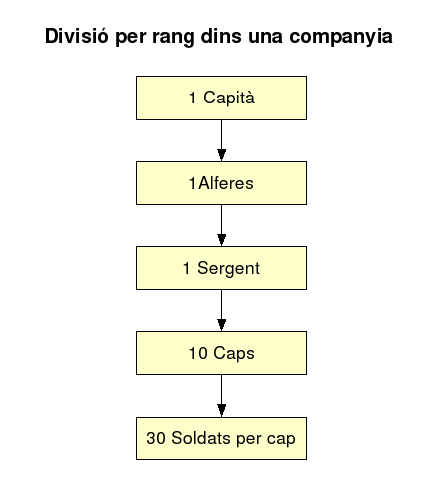 Rango dentro de una compñia